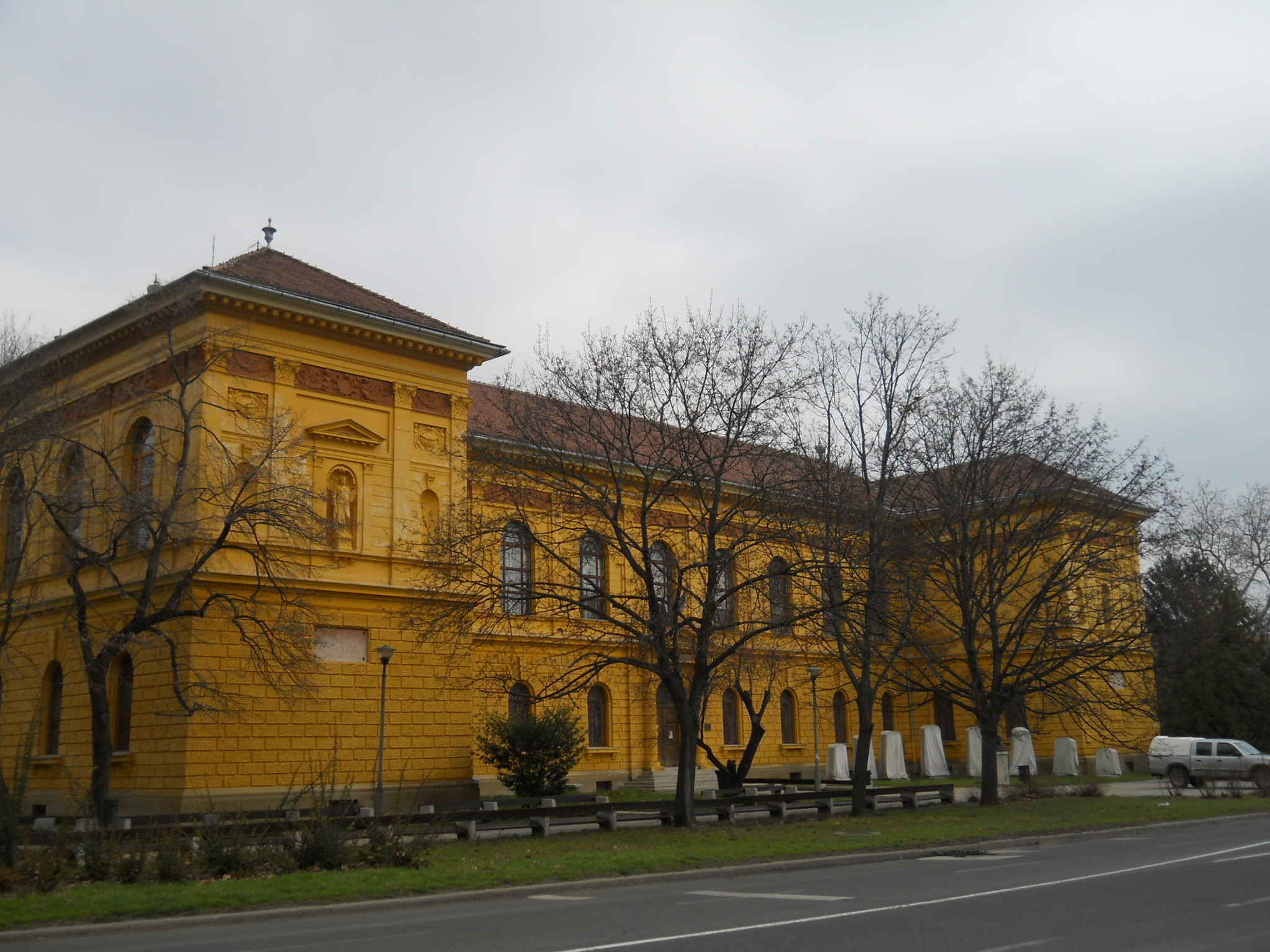 Szekszárd-Wosinsky Mór múzeum